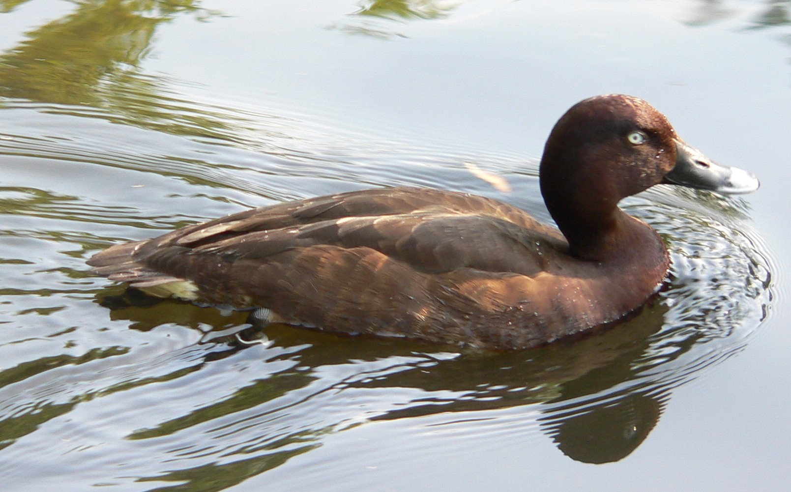 Aythya australis